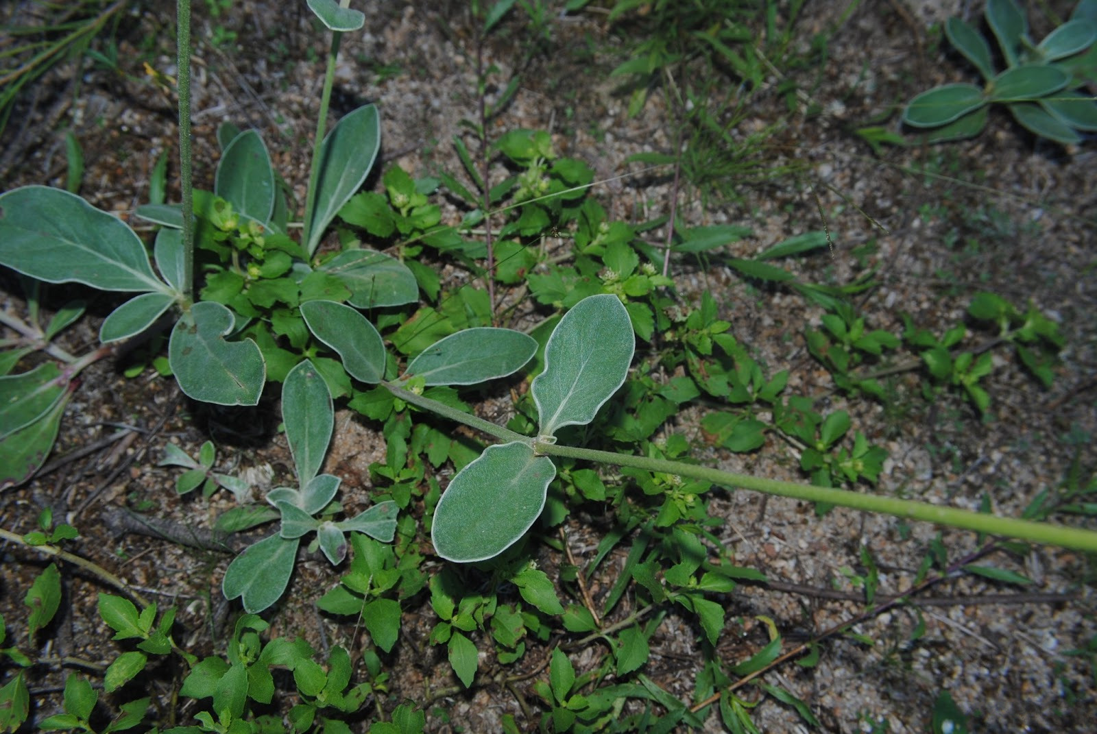 Froelichia tomentosa. Amaranthaceae. Fotos tomadas sobre suelo arenoso en claro de bosque ribereño al margen del Río Negro, Palmar, departamento de Río Negro, Uruguay.